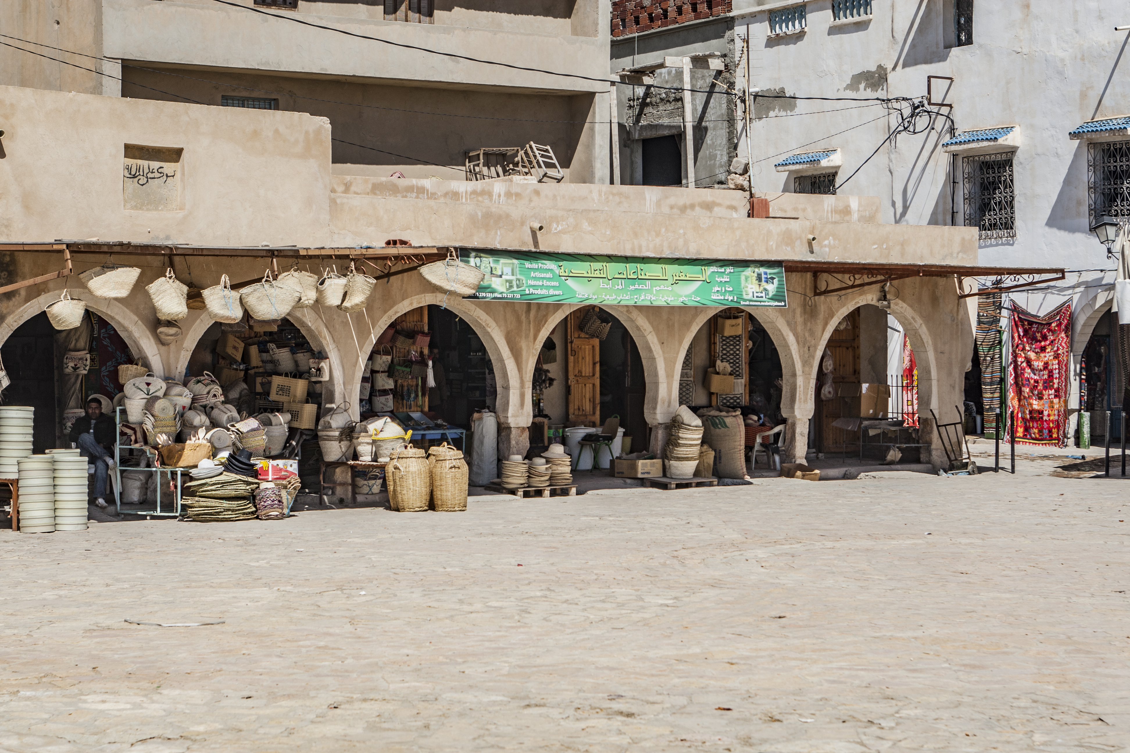 Kabis. Suk przyprawowy Jara